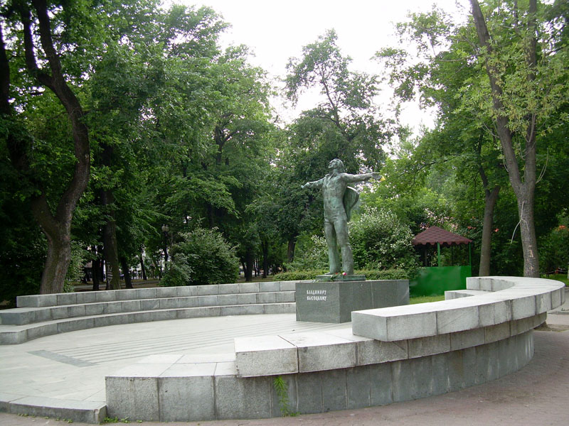 Памятник Владимиру Высоцкому